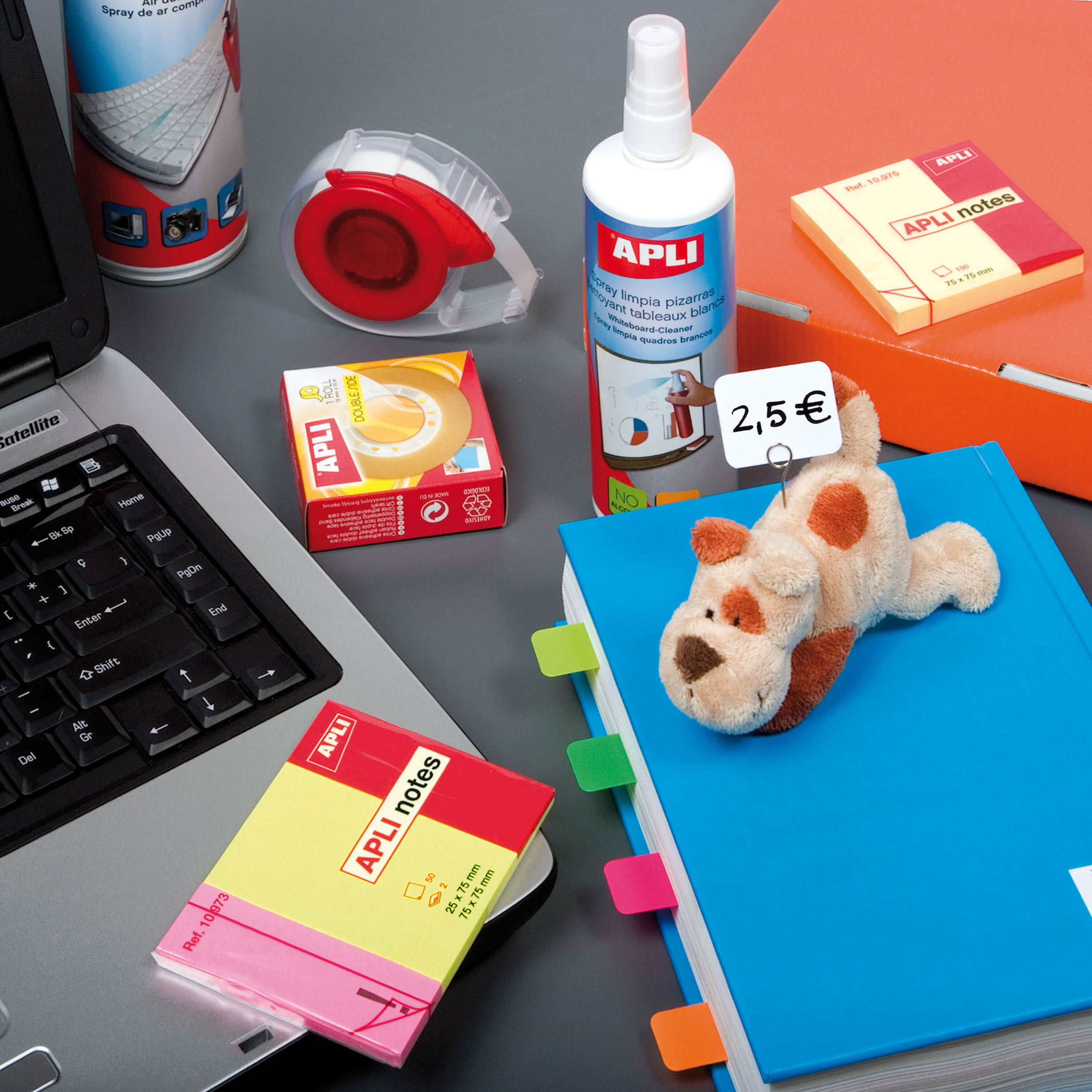 Productos de la gama de Oficina y Comercio, APLI PAPER